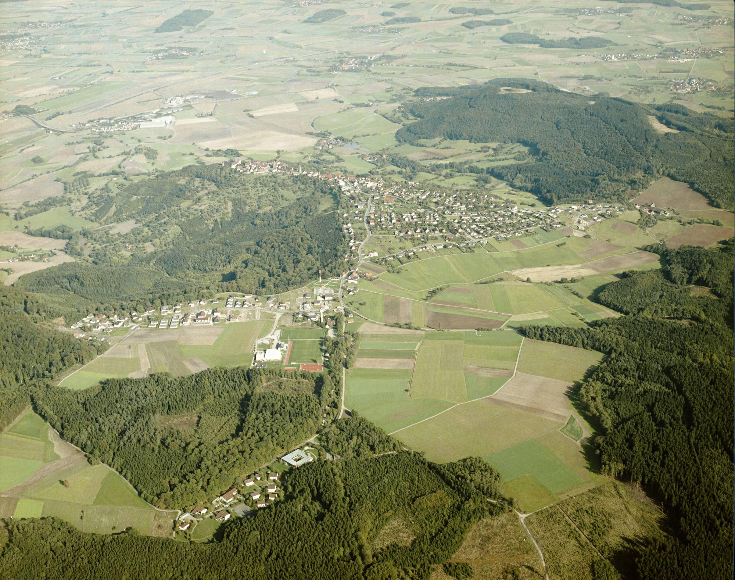 Luftbild von Waldenburg - Staatsarchiv Sigmaringen - Archivalieneinheit N 1/96 T 1 Nr. 651